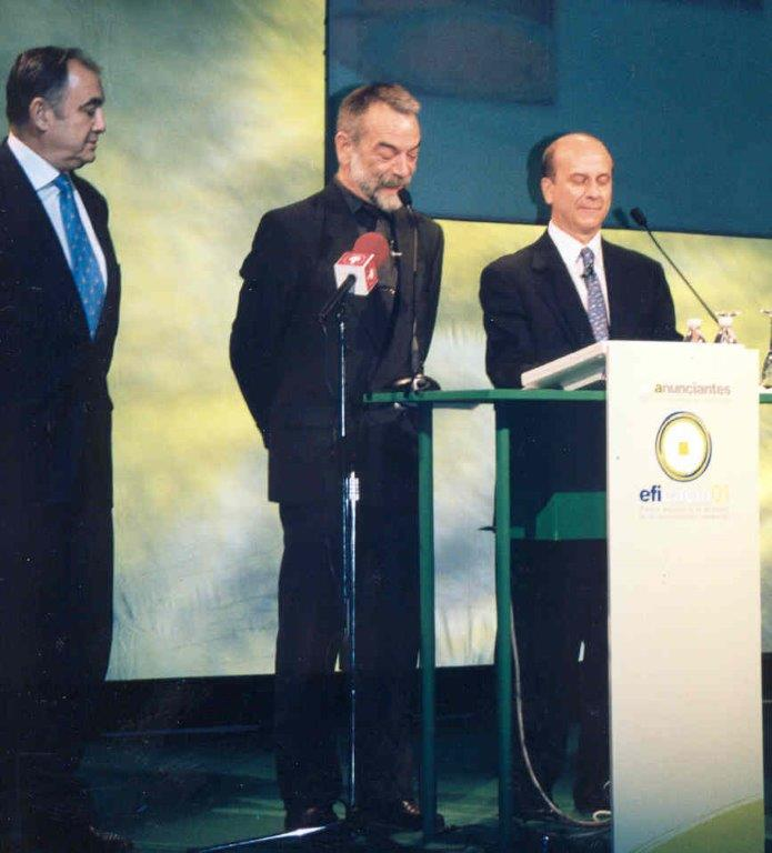 Juan Ramón Plana presentando los I Premios Eficacia 2001, con Juan José Gómez Lagares e Ignacio Salas.